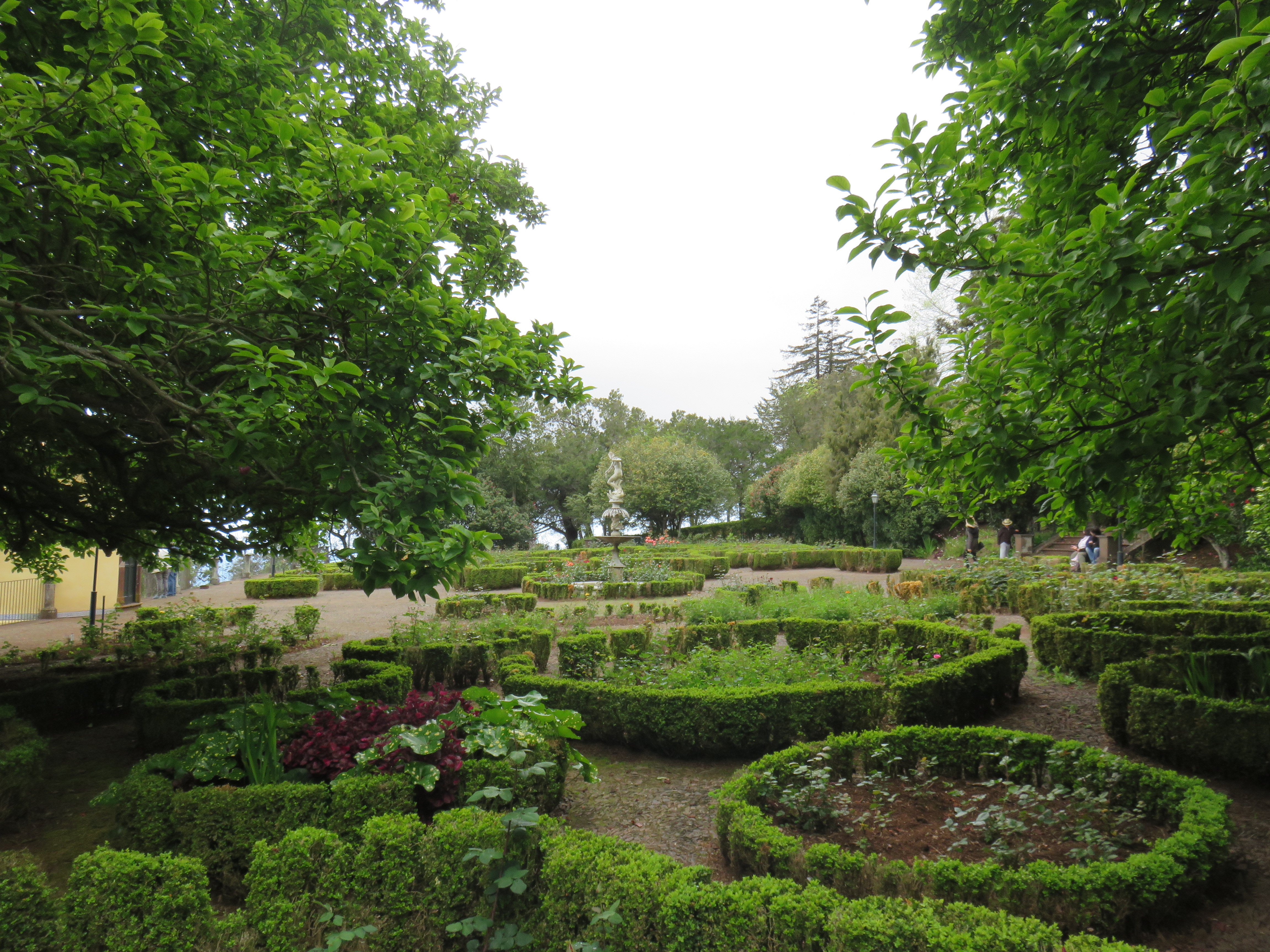 Quinta do Monte - quinta, jardins e parque no Monte, Funchal, Madeira, Portugal Cultural property Quinta do Monte, Monte, Funchal, Madeira, Portugal Q66815971, SIPA ID: 8371 Wiki Loves Monuments ID: DRC-M-220302041